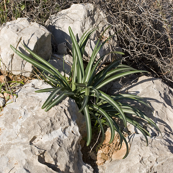 Pancratium parviflorum leaves